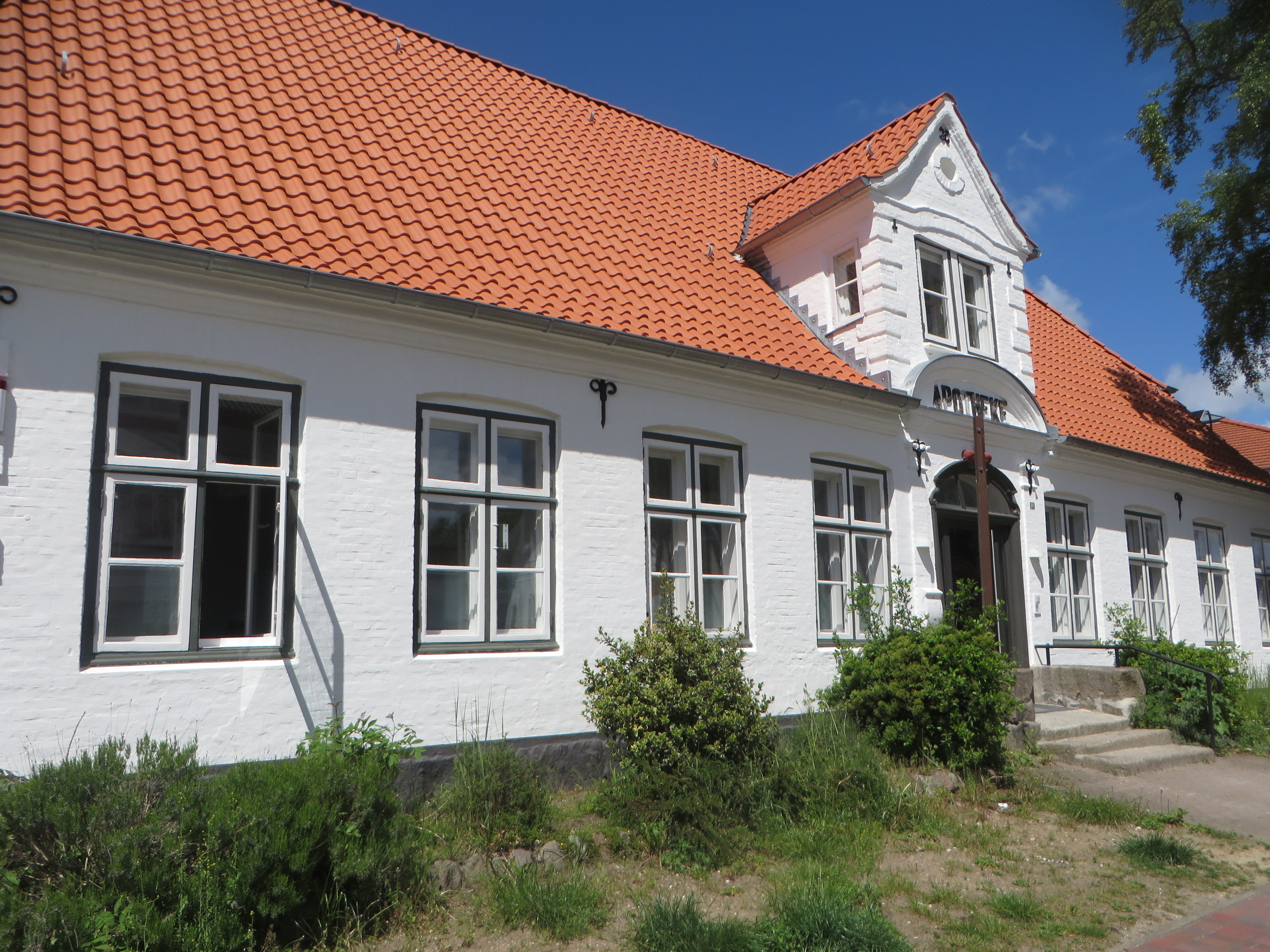 Kronen-Apotheke, Rathausstraße 10 (Glücksburg 2017), Bild 01